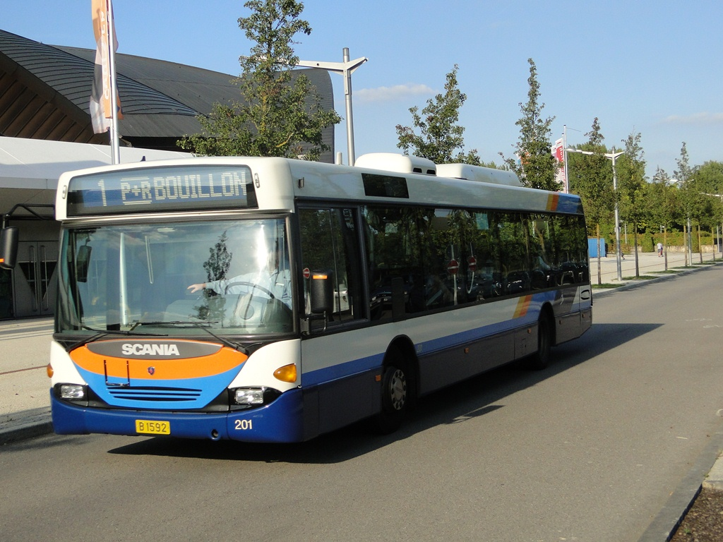 Bus AVL (Autobus de la Ville de Luxembourg) #201 (B 1592). Marque: Scania Fiert um Kirchbierg, av. John F. Kennedy op der Linn 1 Richtung "P+R Bouillon".